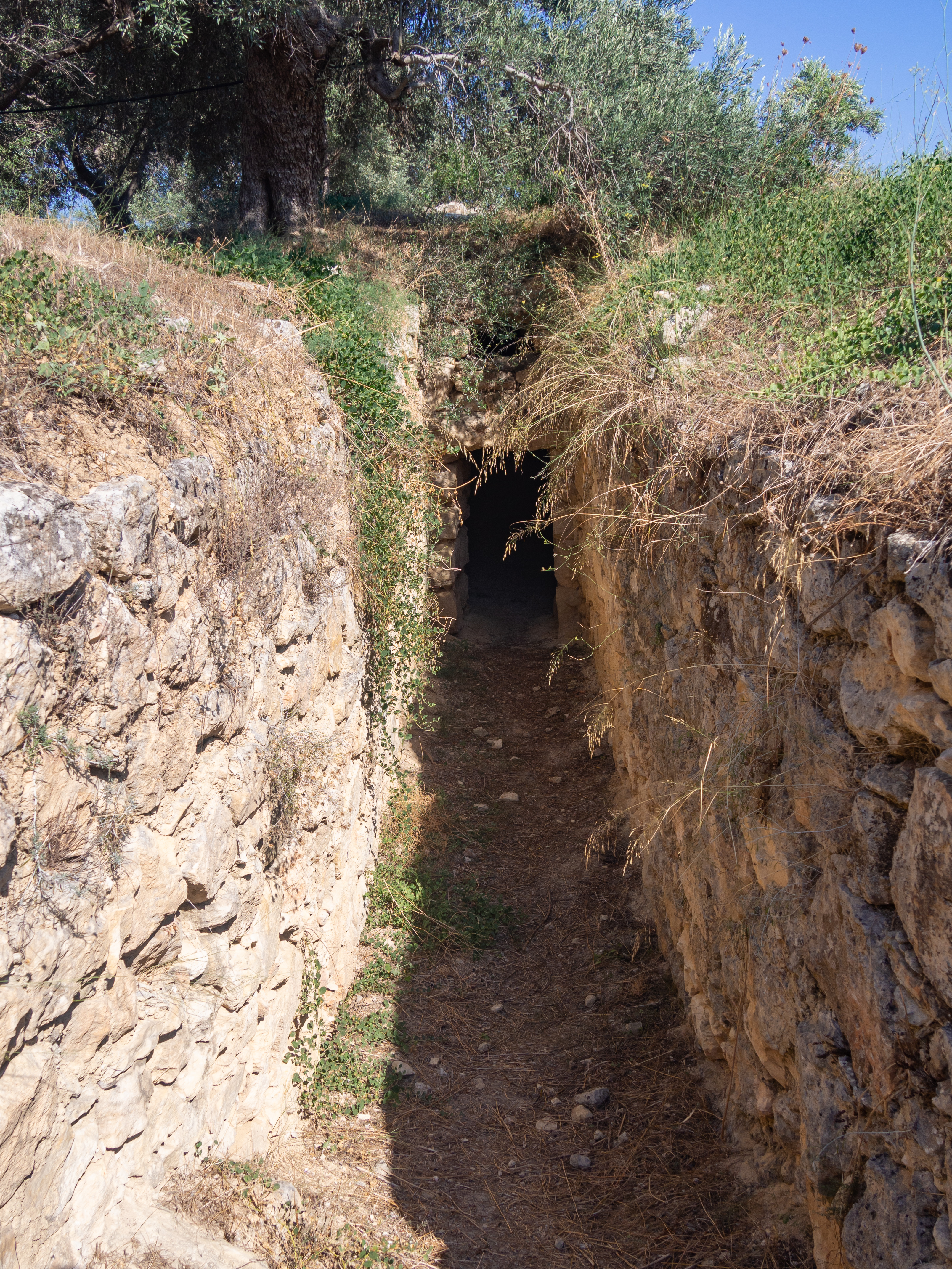 Στύλος, ο θολωτός τάφος στη θέση Αζοϊρές«Στύλος, θέση Αζοϊρές»